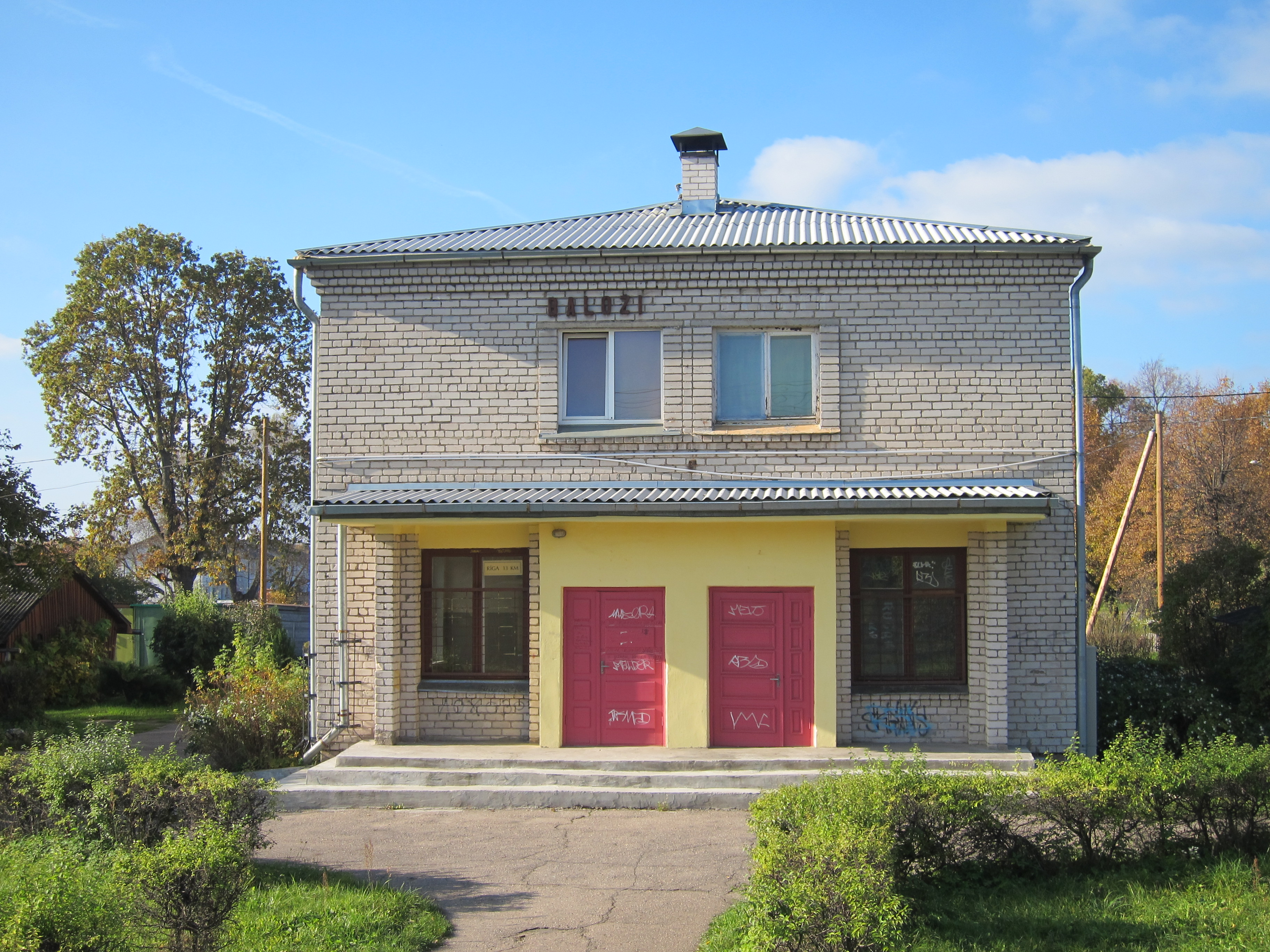 Baložu stacijas ēka